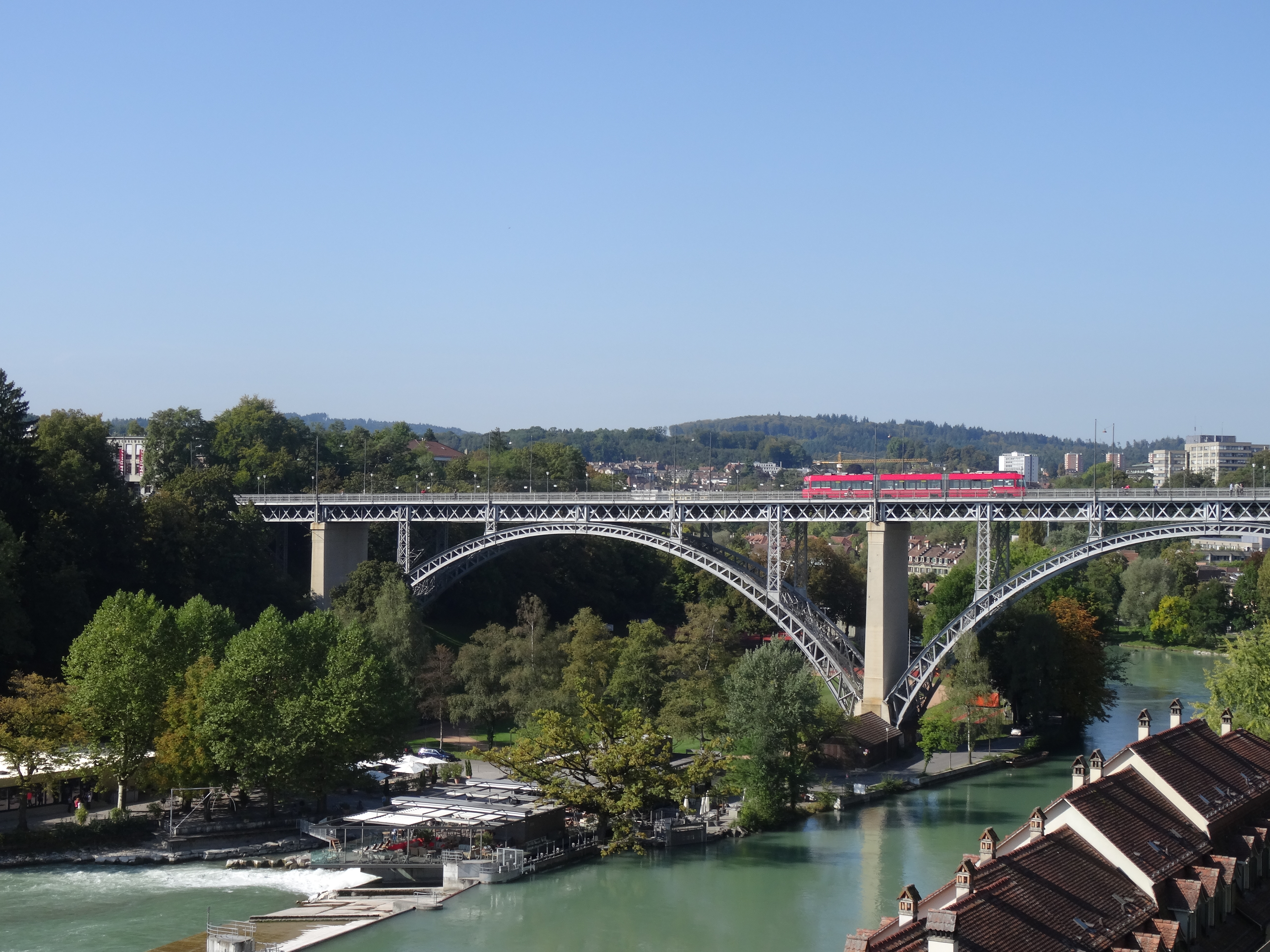 Mattequartier Bern, Kirchenfeldbrücke